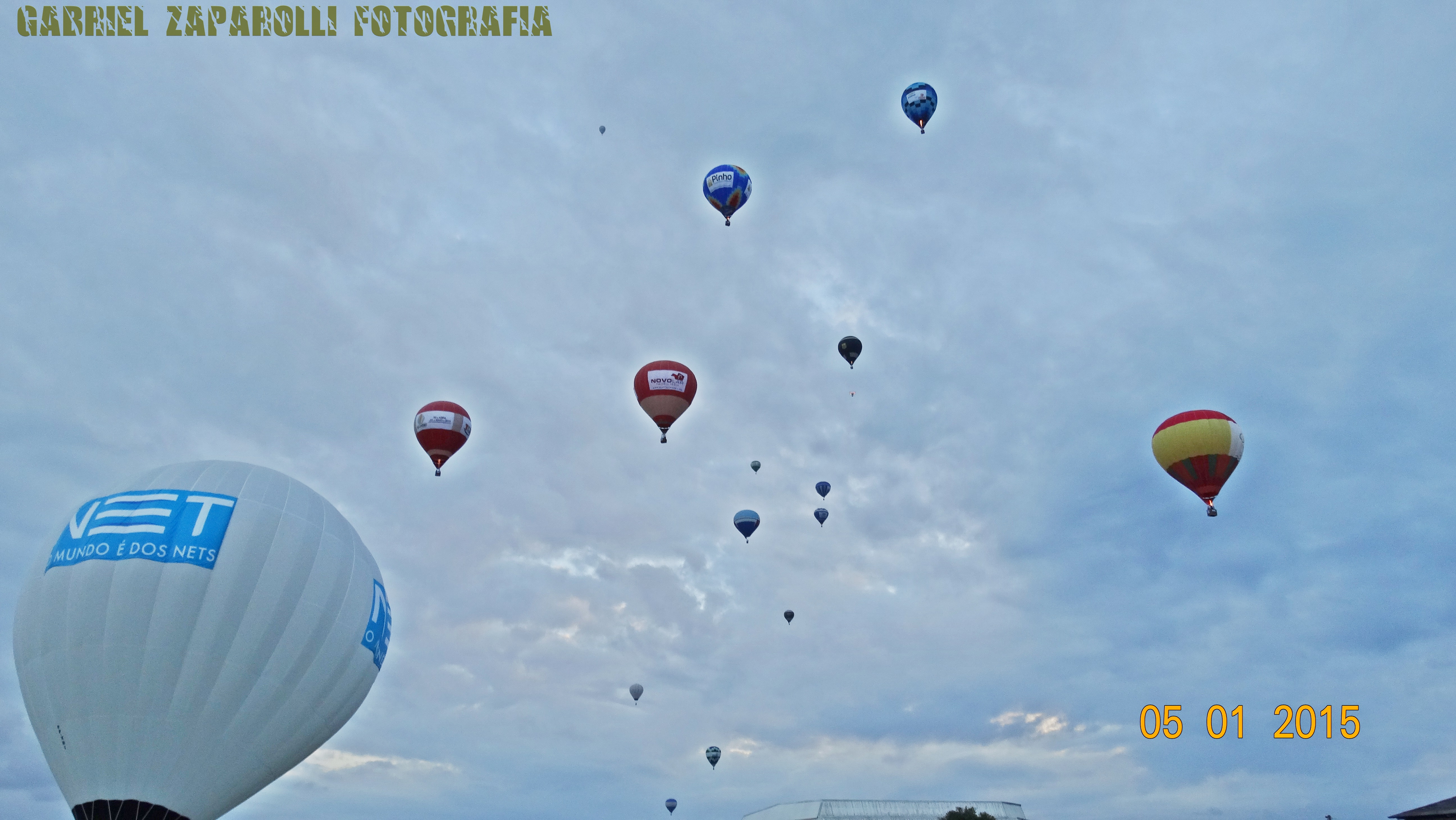 Parque do Balonismo,um lugar aonde é realizado Festival Internacional de Balonismo em Torres. um dos maiores eventos da America Latina,Torres,rs,brazil a capital do balonismo!